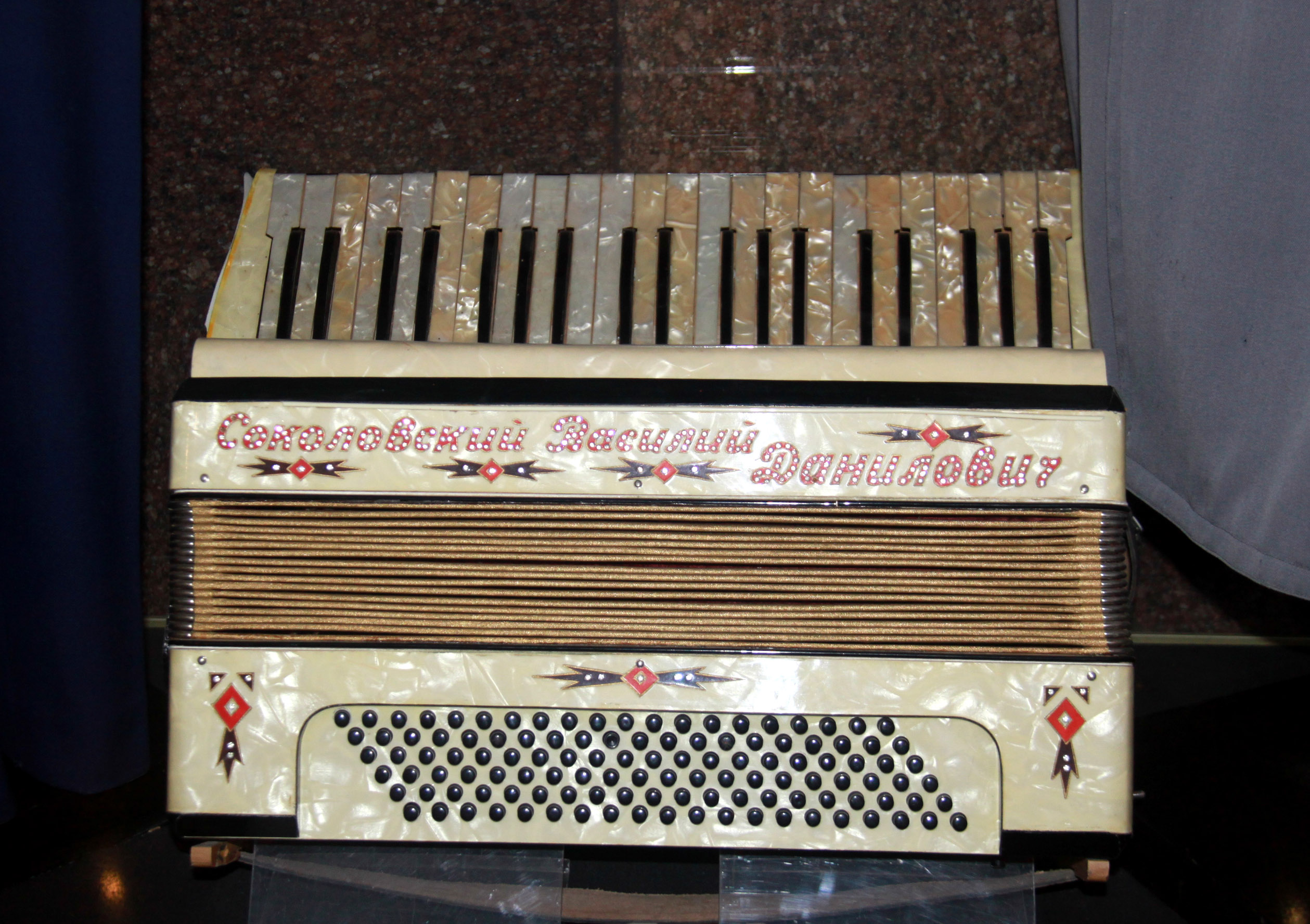 Аккордеон Маршала Советского Союза В. Д. Соколовского. 1940-е годы